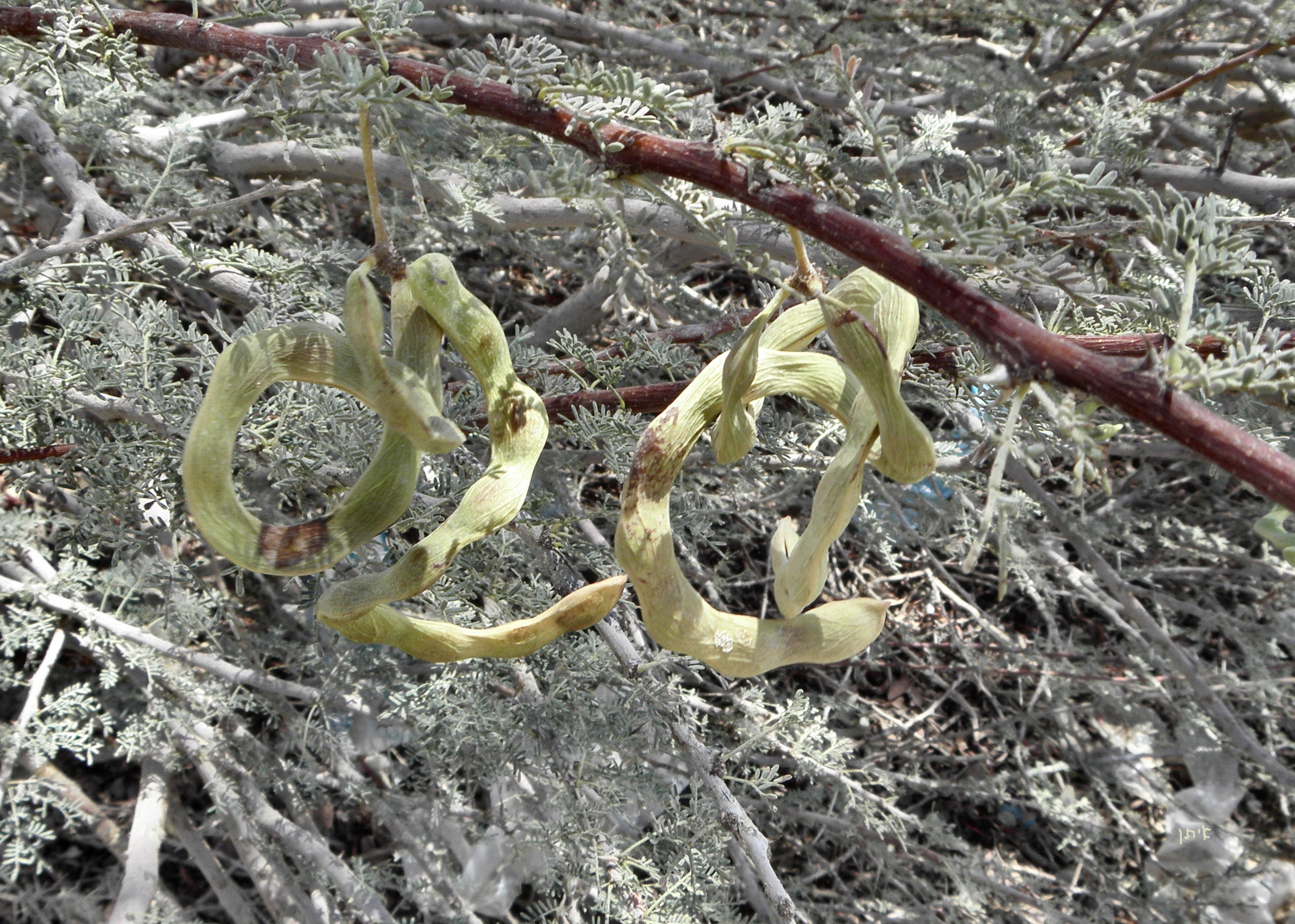 Acacia raddiana pods, Eilat שטה סלילנית - ליד אילת